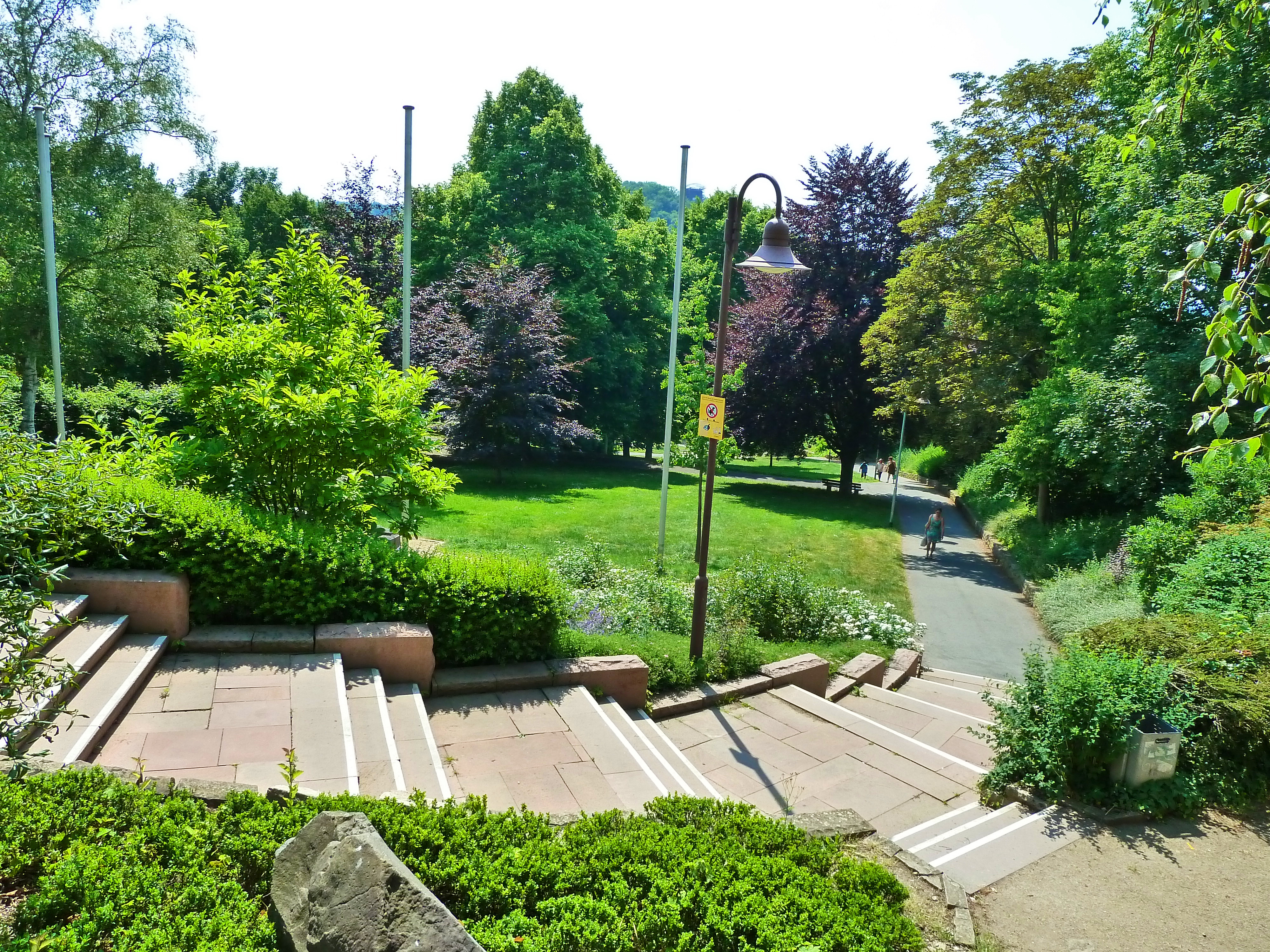 Treppe hoch zur Turmstraße bzw. Säuturm. - You may also want to have a look at our website (in German)